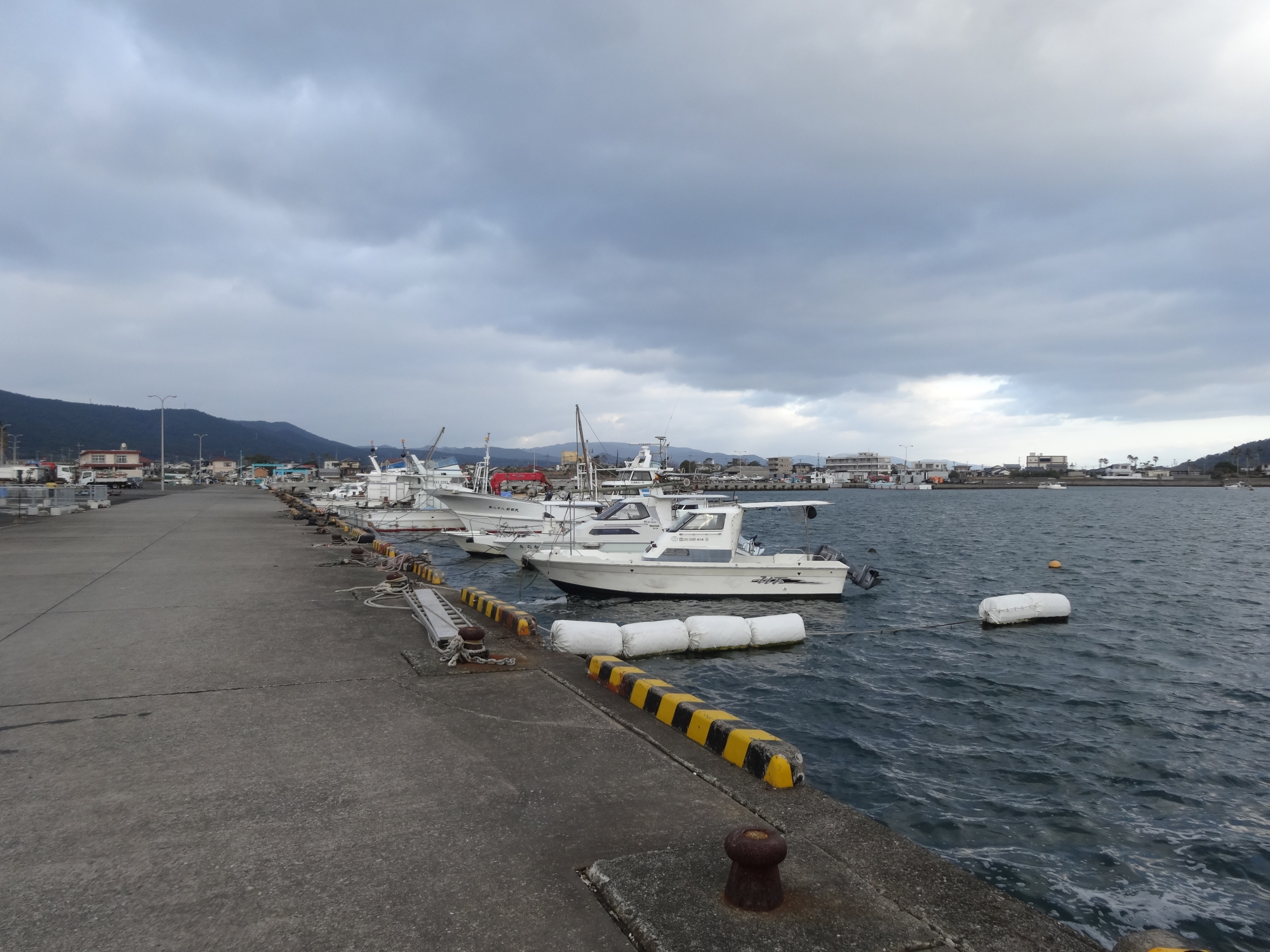 指宿港（鹿児島県指宿市）